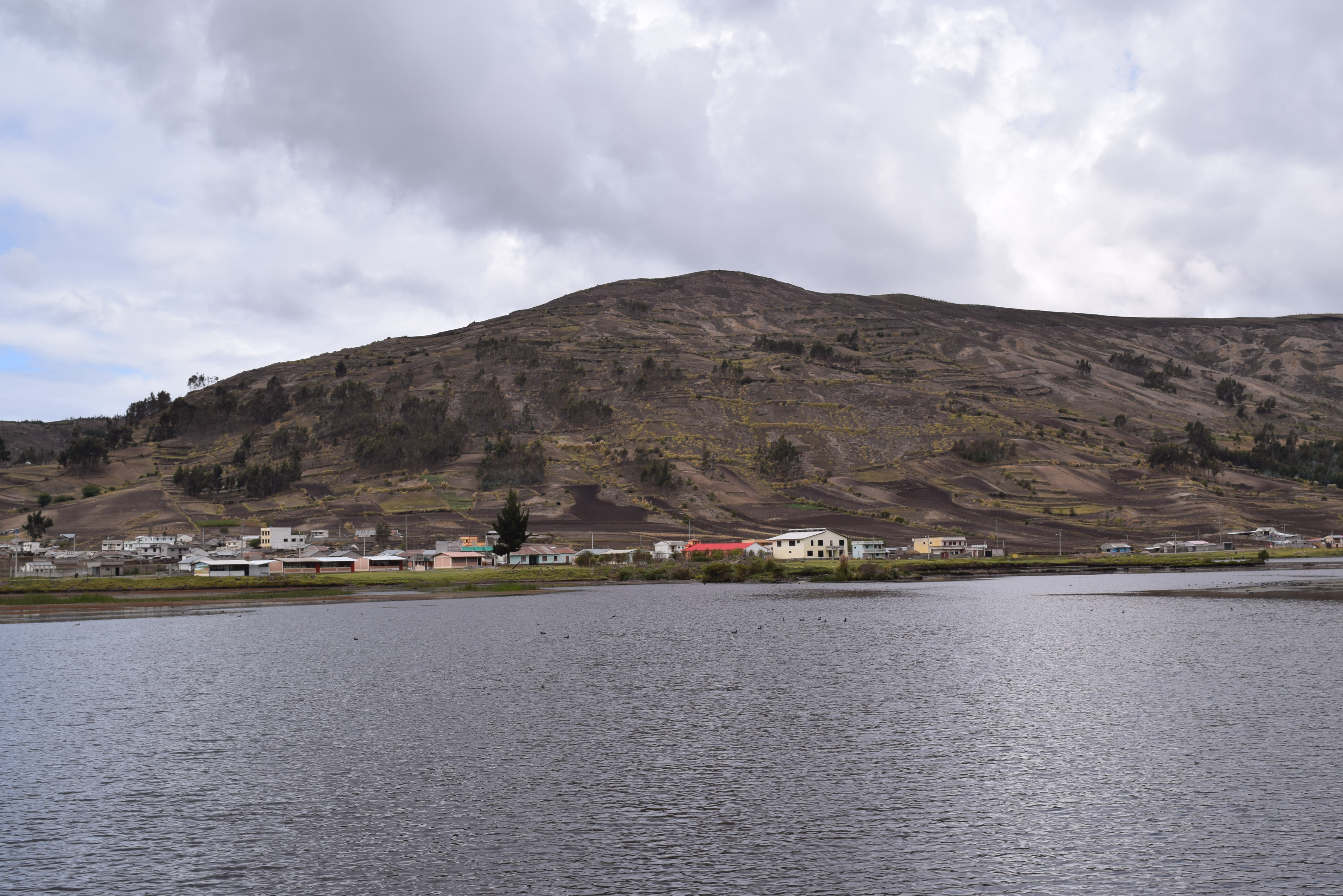 Laguna de Colta (7)